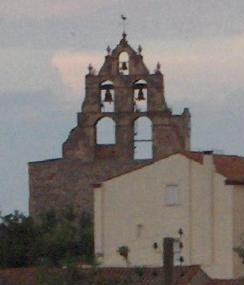 Clocher mur de Trouillas - photo prise par mes soins pas de droits